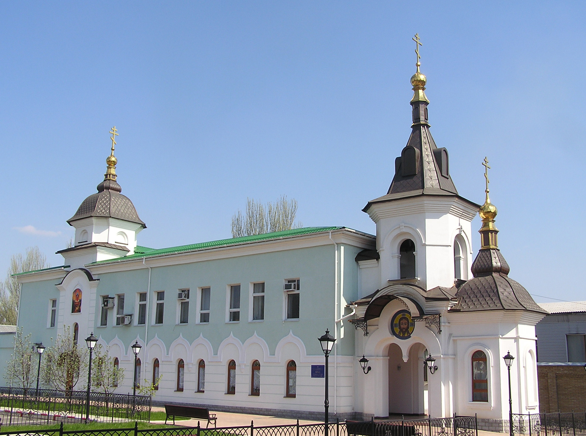 Донецк. Храм Почаевской Иконы Божией Матери